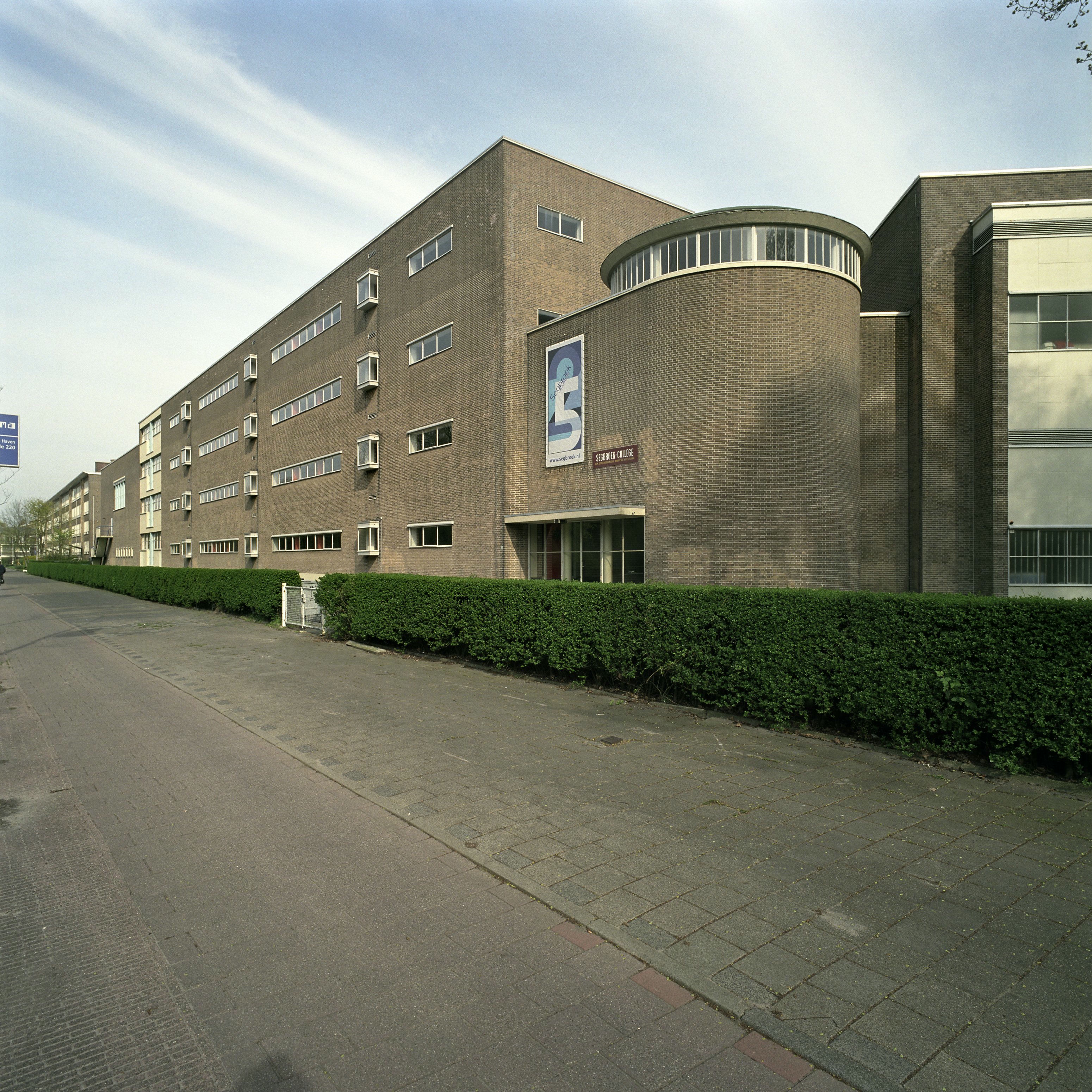 Voormalig Tweede Vrijzinnig Christelijk Lyceum: Overzicht van het schoolgebouw, gezien vanaf de straat